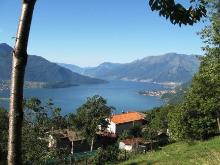 Veduta di Bugiallo, frazione di Sonico